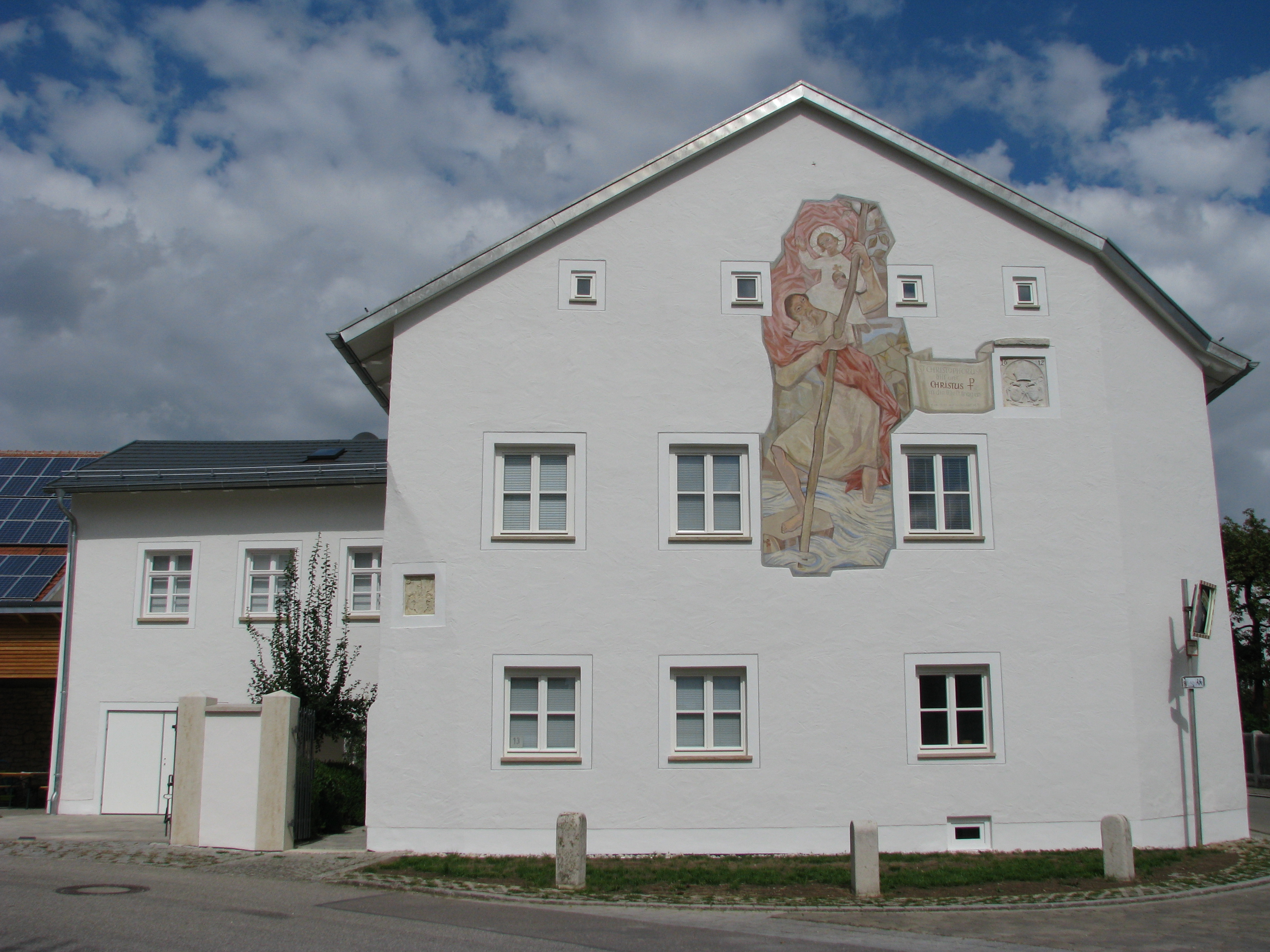 Kaldorf (Gemeinde Titting im Landkreis Eichstätt), Pfarrhof